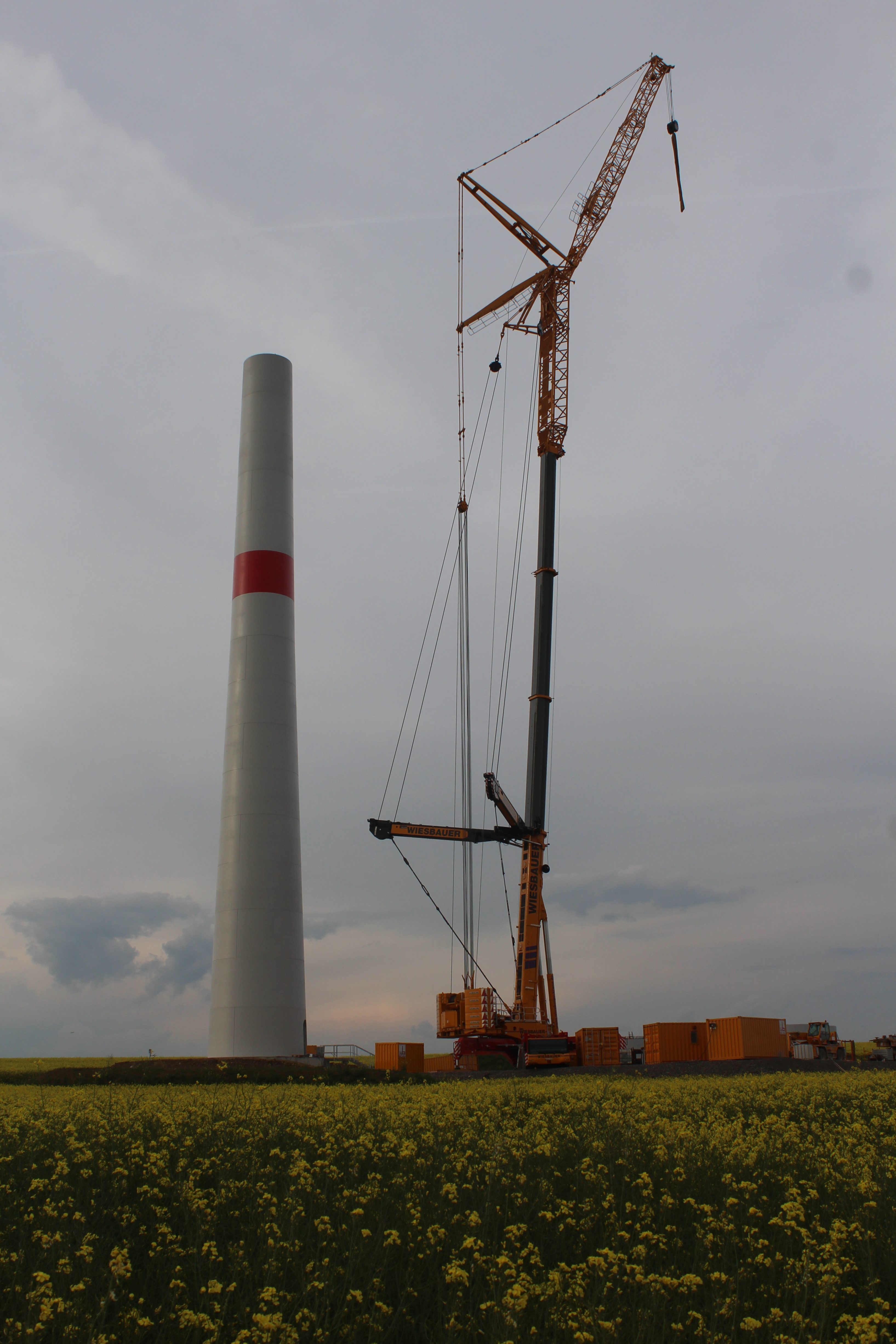 Windkraftanlage 15 des Windparks Strut und Saale